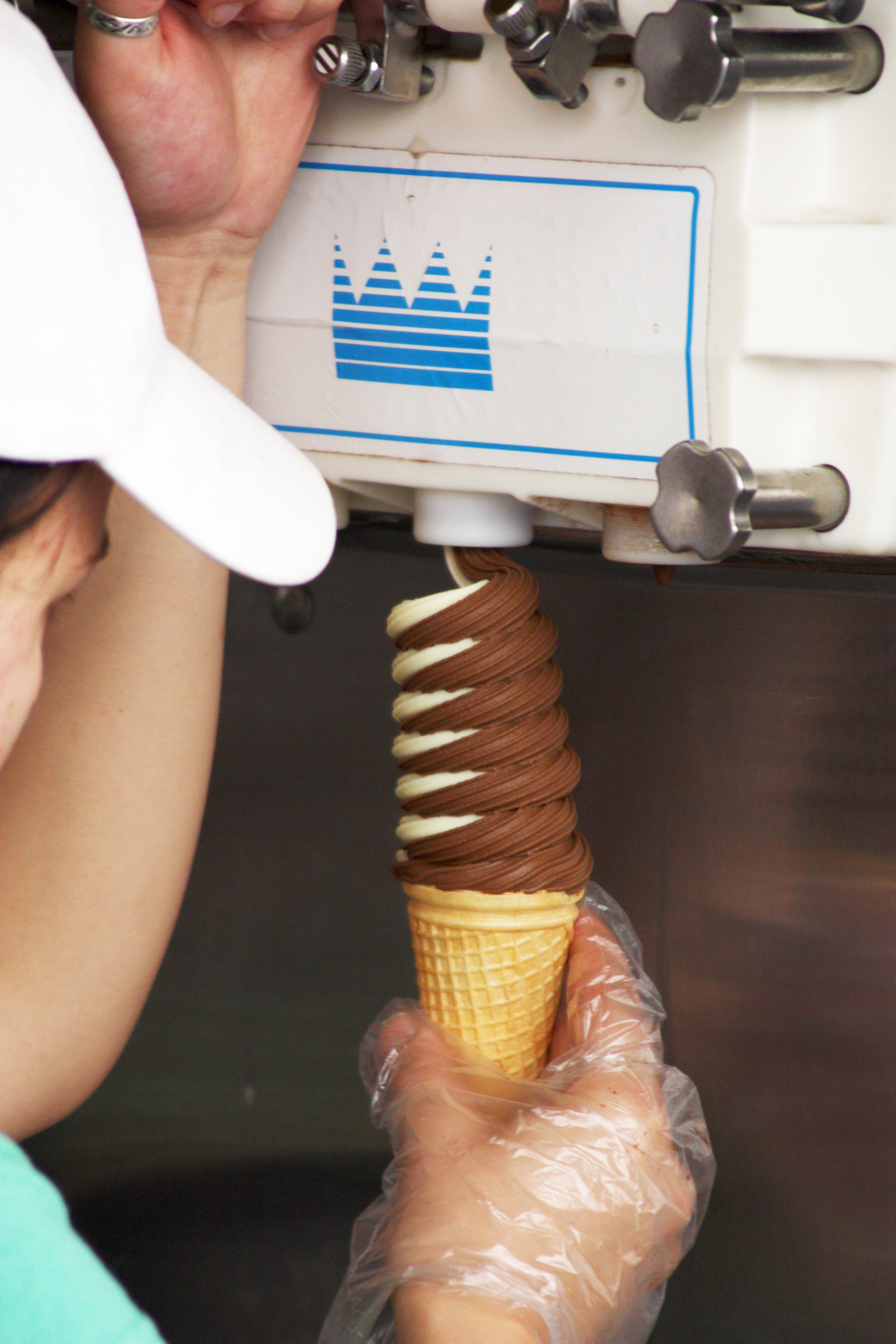 Gdańsk; Touristenfotos 2009